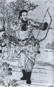 塔齐布，湘军将领，参与平定太平天国。